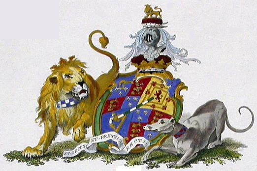 ilustração do Brasão dos Duques de Grafton